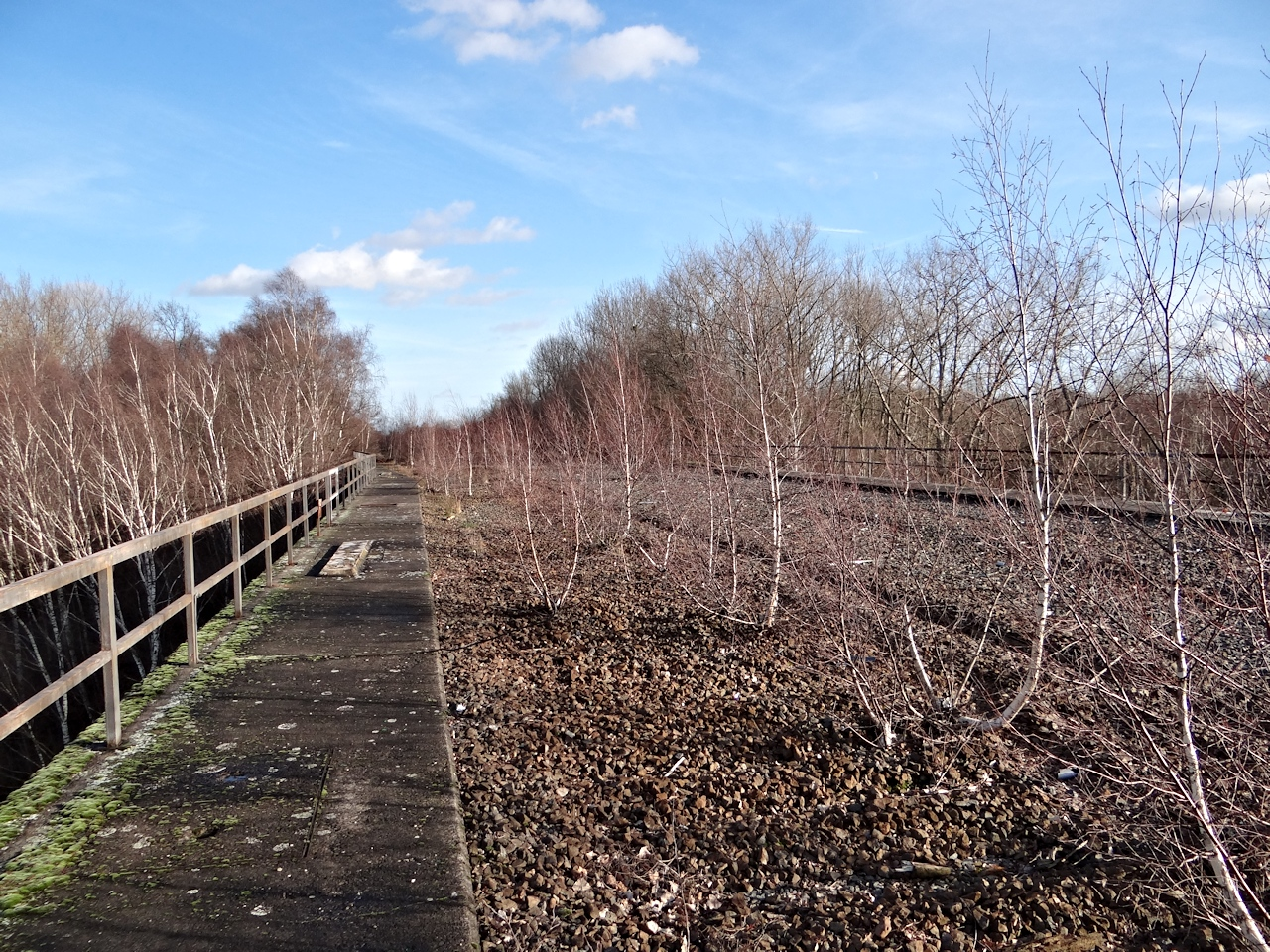 Früherer Einfahrtbereich zum Braunschweiger Rangierbahnhof auf der Okerbrücke am Kennel, der so genannten Echobrücke. Blickrichtung Rangierbahnhof